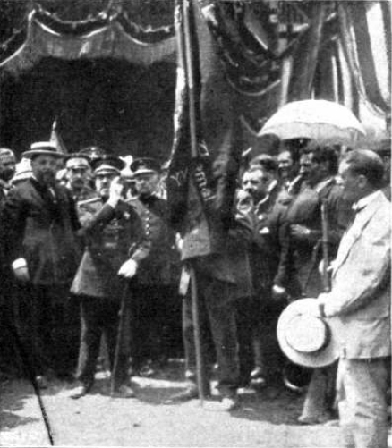 Fotografía del capitán general de Cataluña, Valeriano Weyler, arengando al somatén de Barbará con motivo de la bendición de su bandera.